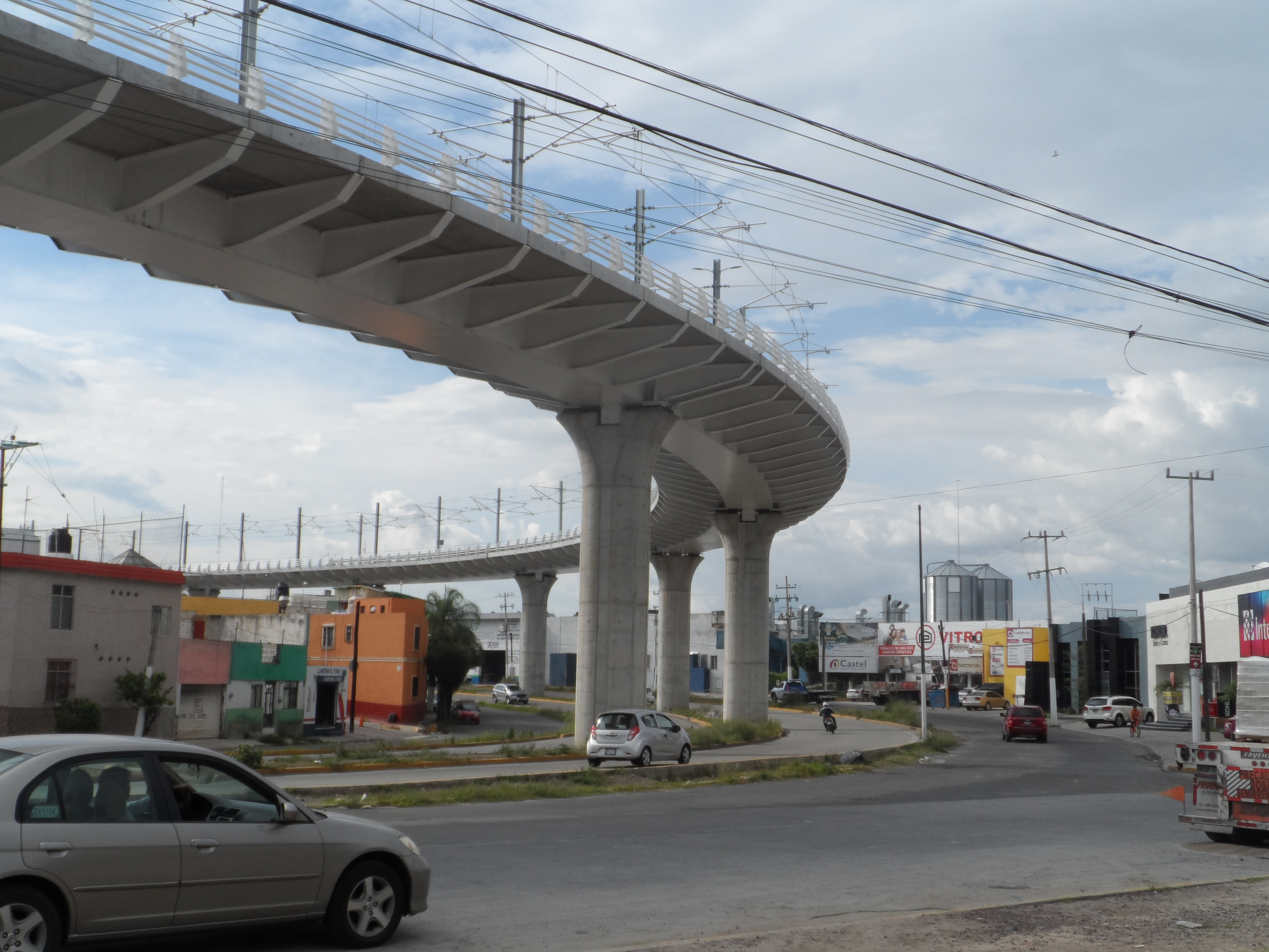 Curva pronunciada del Viaducto 1 de la Línea 3 del Tren Ligero de Guadalajara, entre las estaciones Mercado del Mar y Basílica de dicha línea.